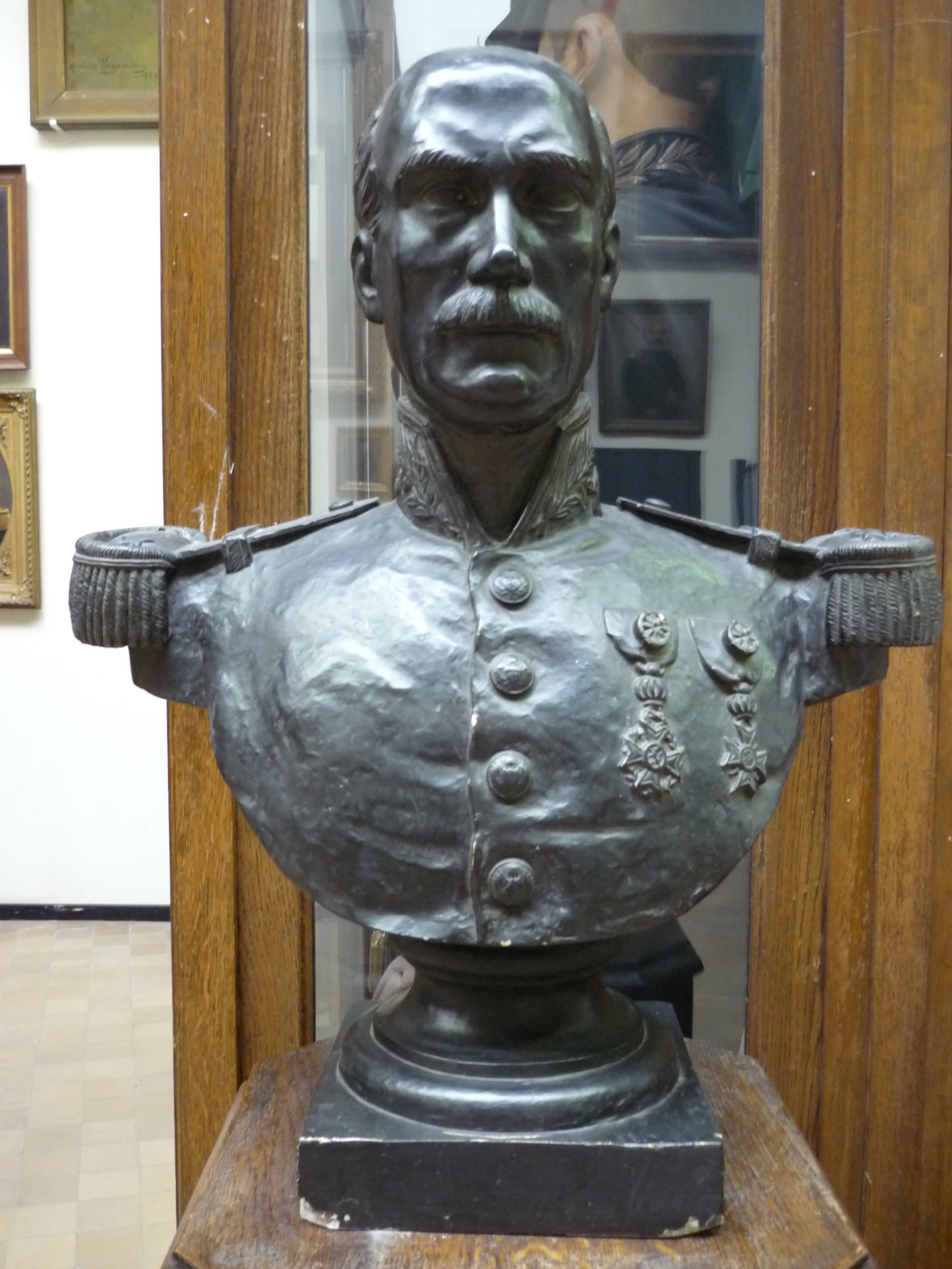 Buste du baron Greindl, Musée du Cinquantenaire, Bruxelles, Belgique. Royal Museums of Art and History Native nameMusées royaux d’art et d’histoireLocationBrusselsCoordinates50° 50′ 25.85″ N, 4° 23′ 35.37″ E Established1835Web page control : Q945059 VIAF: 147671754 ISNI: 0000 0001 2342 957X GND: 1006854-5 SUDOC: 162391722 institution QS:P195,Q945059